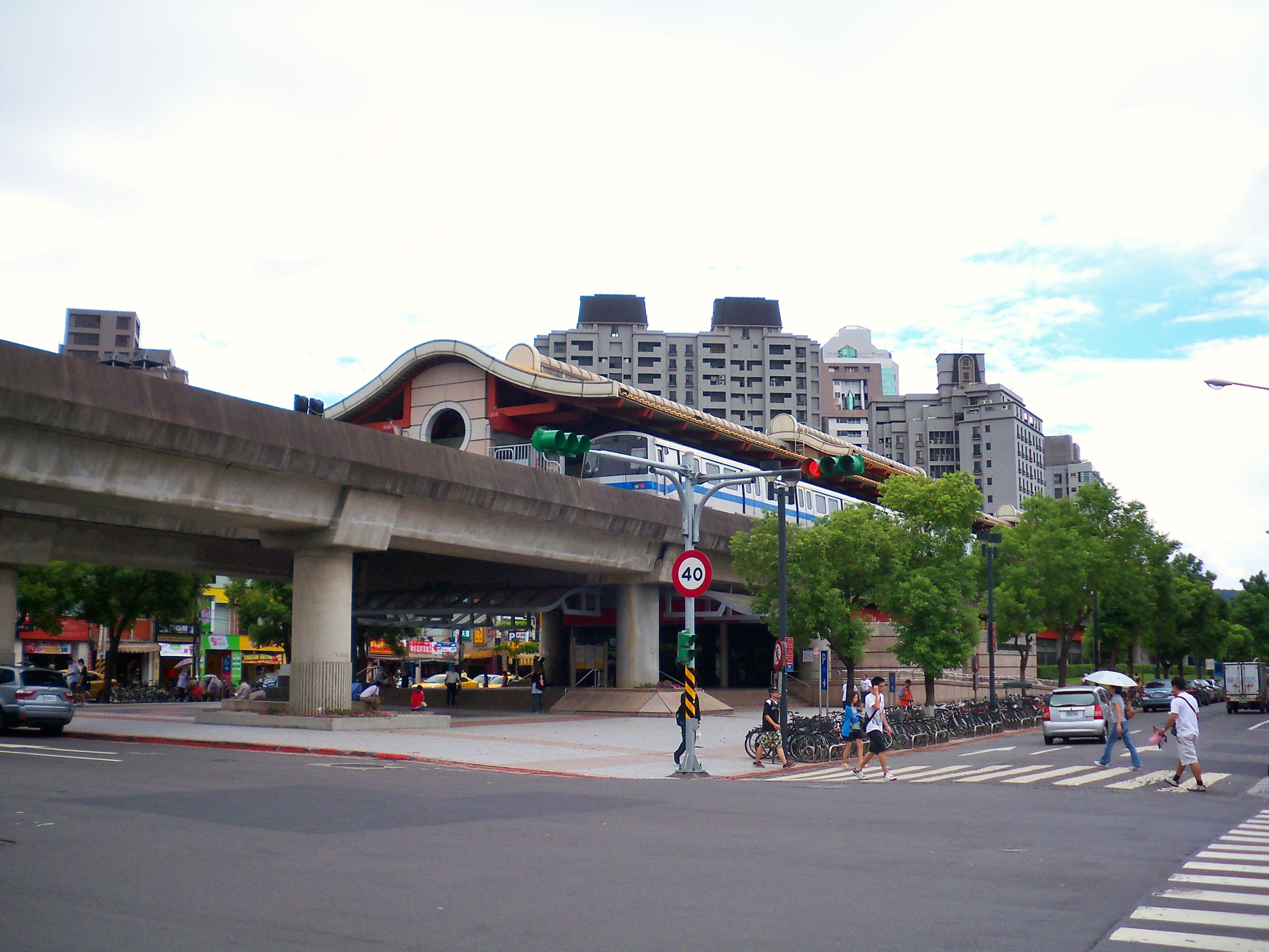 台北捷運淡水線石牌駅駅舎。